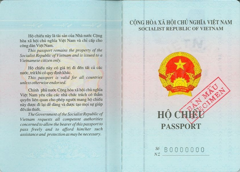 Trang Tuyên bố Hộ chiếu Việt Nam